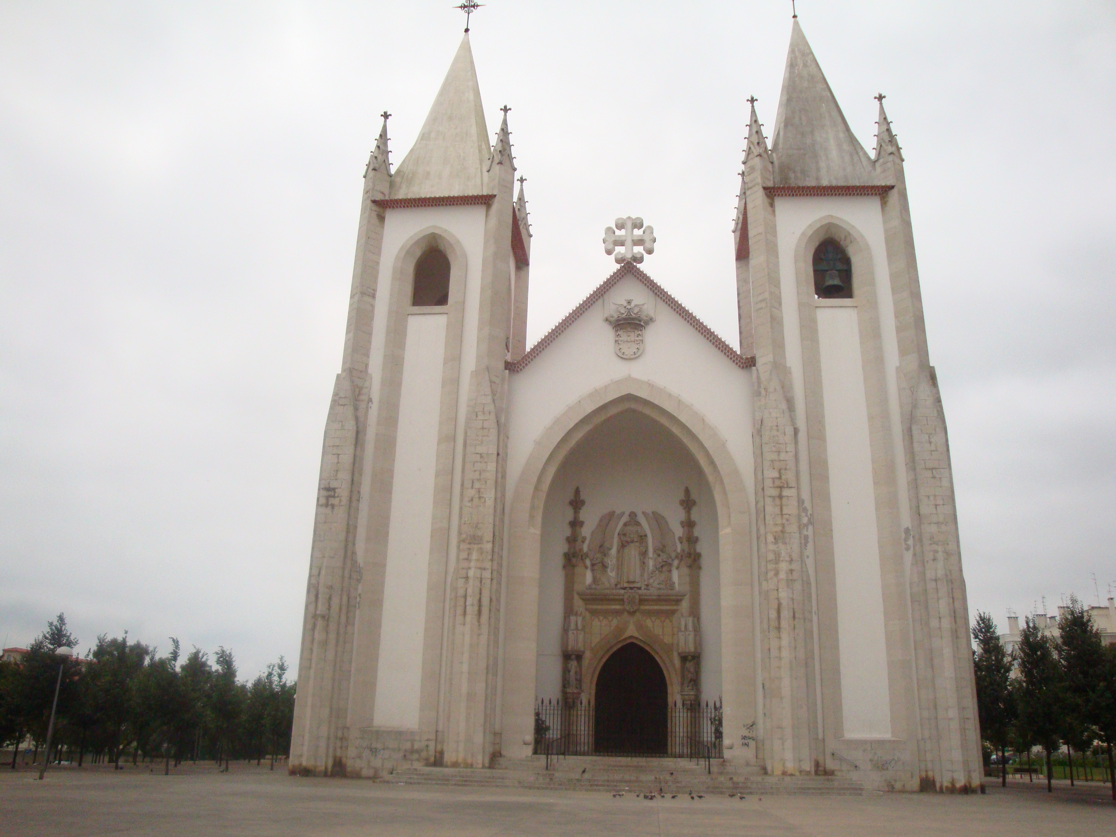 Igreja de Santo Condestável, Lisboa